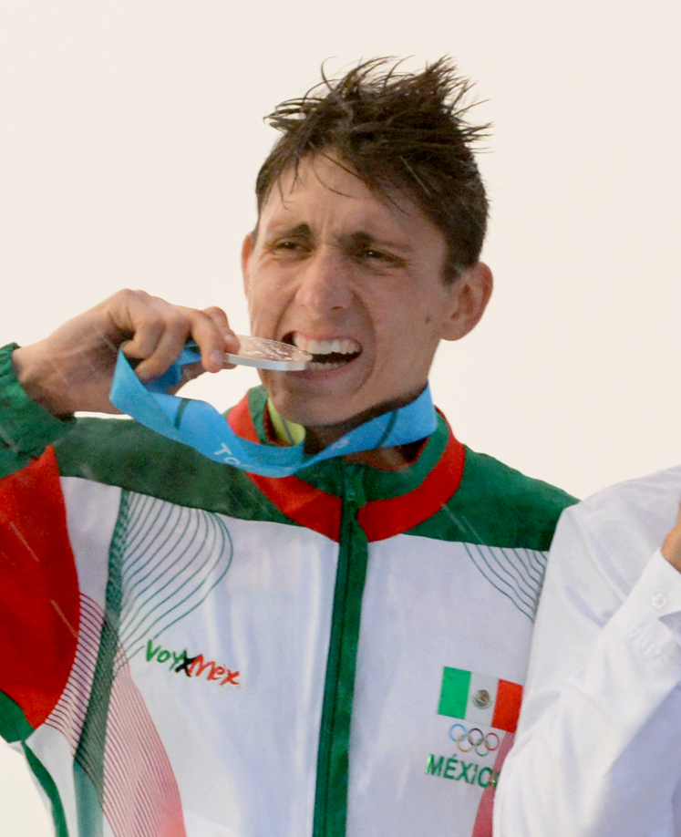 Ismael Hernández (pentathlete), 2015 Pan American Games